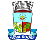 Brasão_Nova_Soure_BA.gif